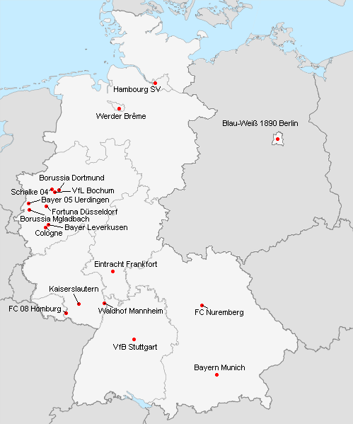 Répartition des clubs en 1.Bundesliga 1986-1987.